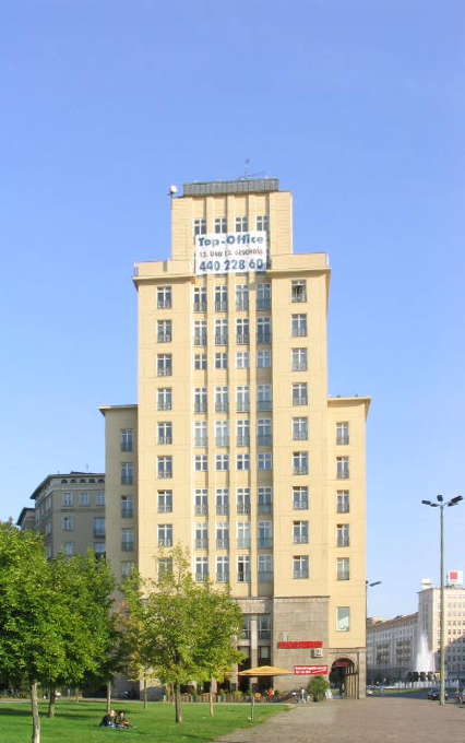 Description: "Haus Berlin" am Strausberger Platz. Bauzeit: 1951-1953. Architekten: Hermann Henselmann. Vom Westen aus fotografiert. View on the building "Haus Berlin" on Strausberger Platz in Berlin, seen from the west. Source: self-made. I release it into the public domain. Gryffindor 00:53, 10 March 2006 (UTC)